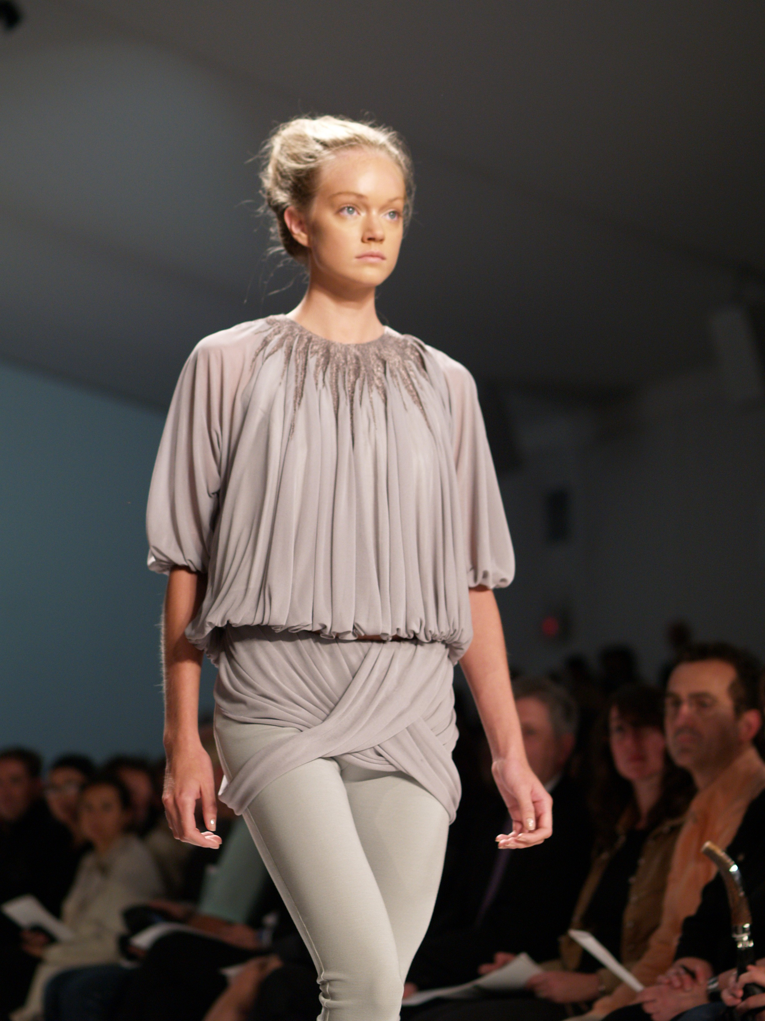 Model Lindsay Ellingson